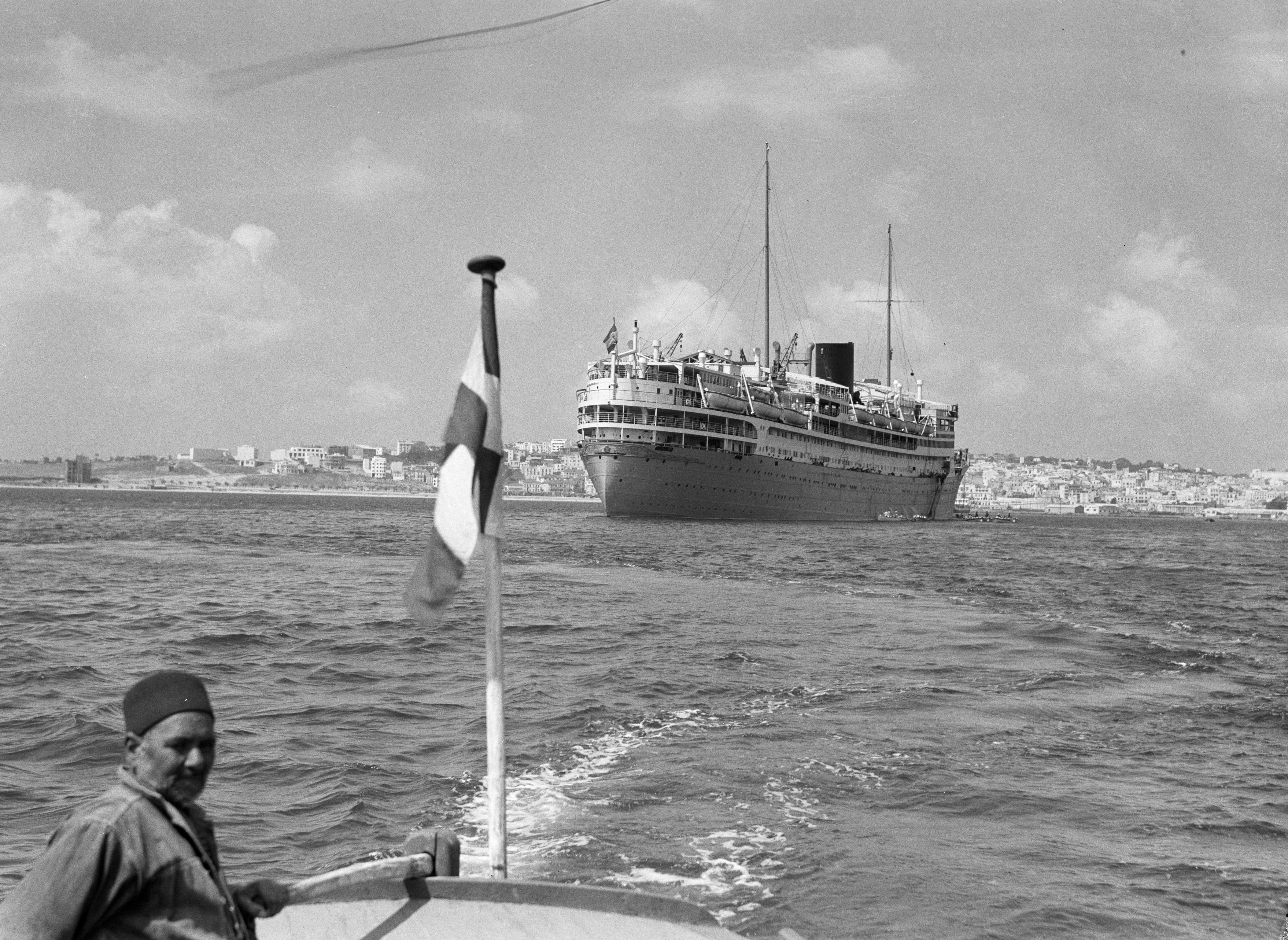 Collectie / Archief : Fotocollectie Van de Poll Reportage / Serie : Zeereis met MS Baloeran Beschrijving : Zicht vanuit een sloep op het passagiersschip Baloeran op de rede van Tanger. RL op de vlag staat voor Rotterdamse Lloyd Annotatie : Deze foto maakt deel uit van een serie foto's van een reis met de MS Baloeran van de Rotterdamse Lloyd Datum : 1935 Locatie : Marokko, Tanger Trefwoorden : havens, schepen Fotograaf : Poll, Willem van de Auteursrechthebbende : Nationaal Archief Materiaalsoort : Glasnegatief Nummer archiefinventaris : bekijk toegang 2.24.14.02 Bestanddeelnummer : 191-0193 Reacties Geplaatst door Nienke van Leur-Postma op 01 december 2017 - 00:57. Mijn grootvader Jan Postma was vanaf augustus 1933 (reisnummer 15) opeenvolgende jaren werkzaam aan boord van het ms Baloeran als 3e Machinist, in dienst van de Rotterdamsche Lloyd . Jan Postma's laatste reis op dit schip van de RL was op 18 mei 1935 (reisnummer 22). In 1935 werd door fotograaf Willem van de Poll deze afbeelding gemaakt, een onderdeel van zijn serie foto's van een reis aan boord van dit mooie schip. Misschien maakt een afbeelding van mijn grootvader onderdeel uit van v.d. Poll's reportage?